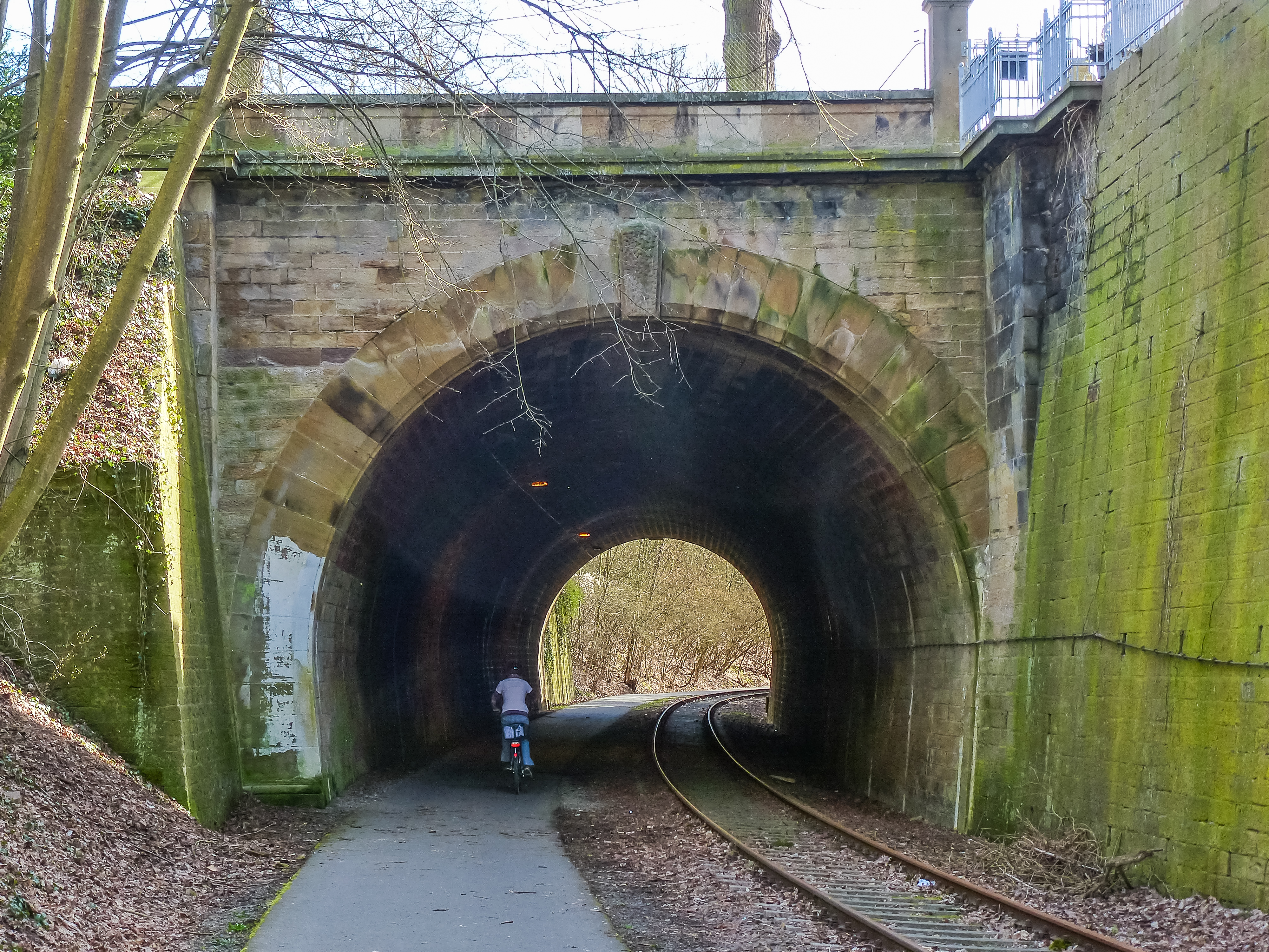 Meisenheimer Eisenbahntunnel Nordseite